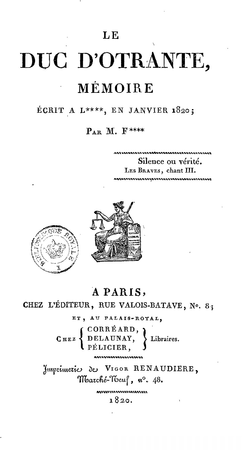 Frontispício das pretensas memórias de Joseph Fouché, lançadas em Paris em 1820, ano de sua morte.